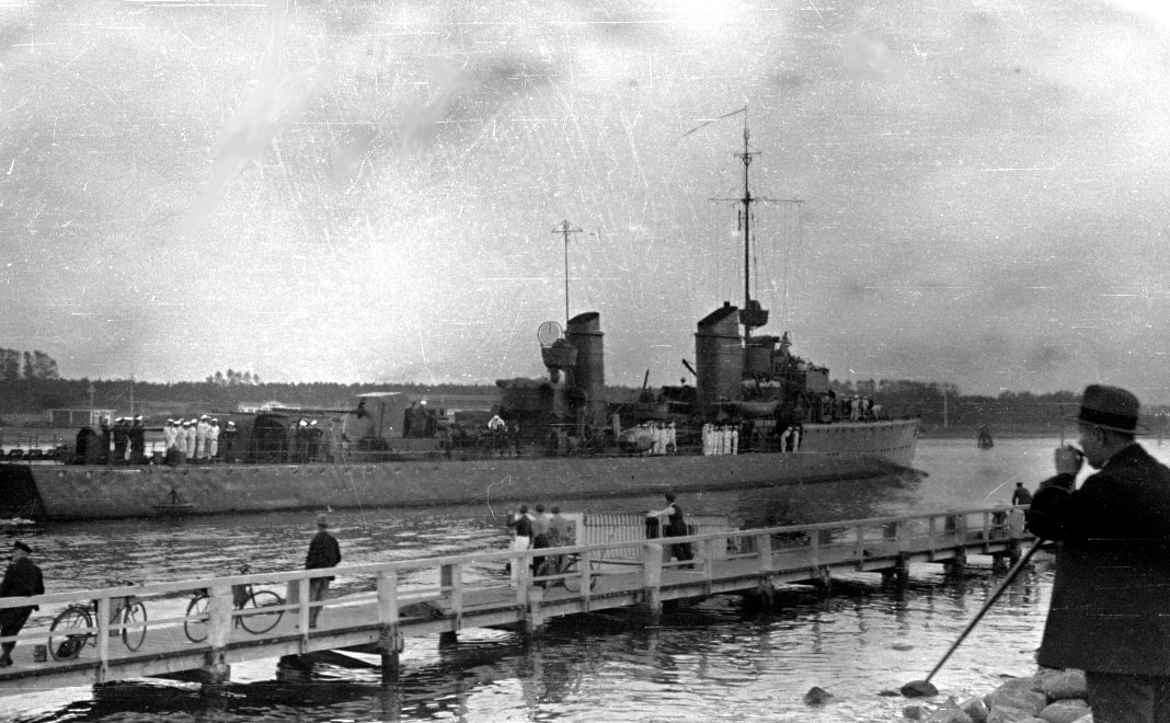 sehr wahrscheinlich das Torpedoboot Leopard (Typ 24) im Juni 1934 bei Neustadt in Holstein.